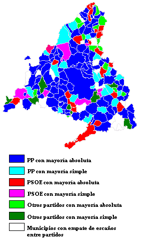 Resultados de las elecciones municipales 2007 según municipios